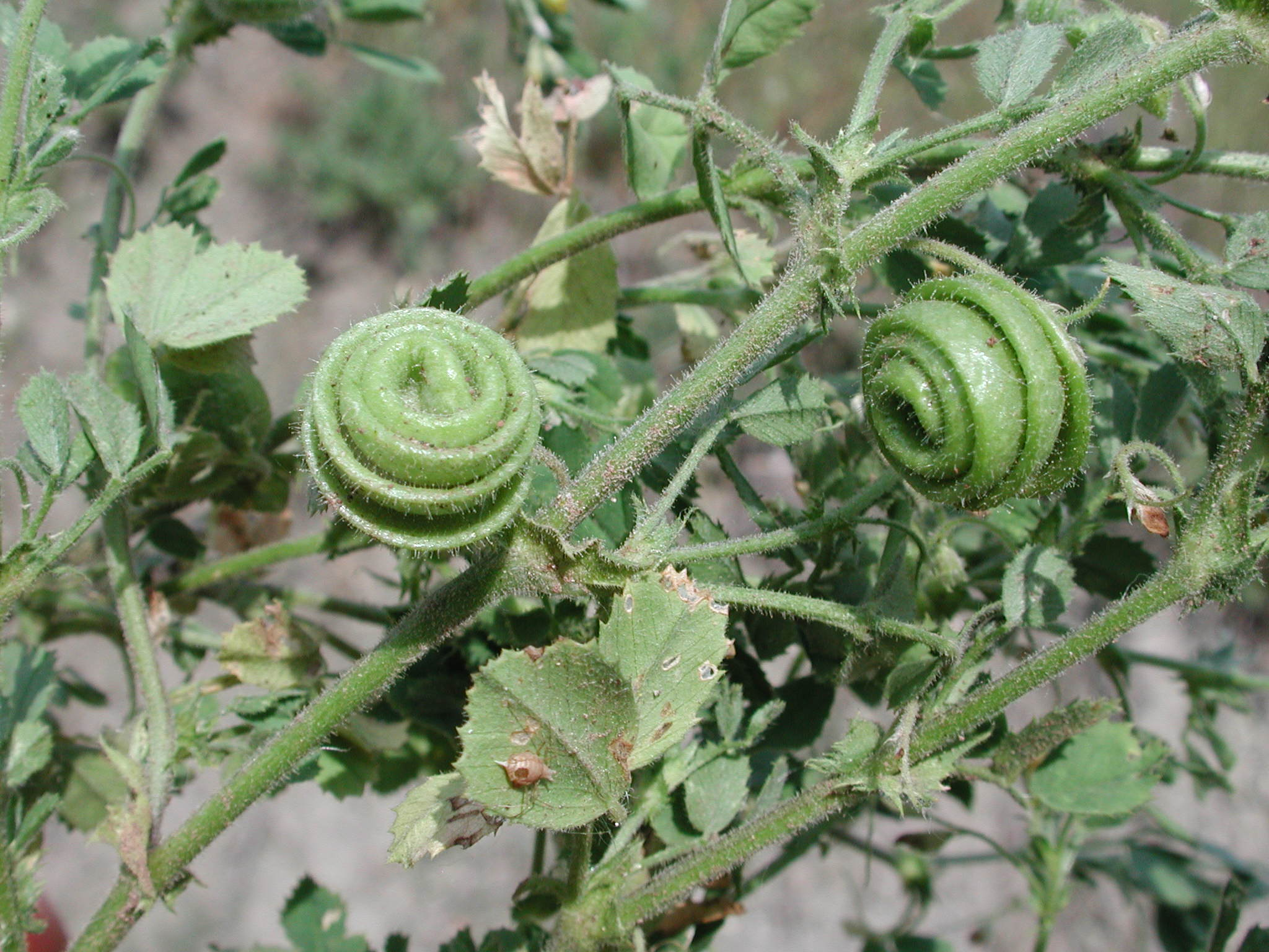 particolare di frutti di Medicago scutellata